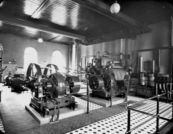 Generatoren zur Stromerzeugung für das Vierortbad